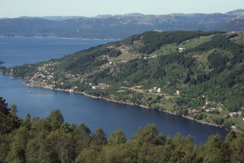 Stranda sett fra syd. Foto: Thorleif Rødland.